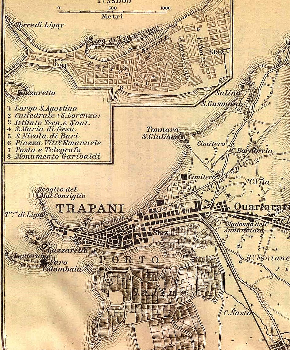 trapani carta antica